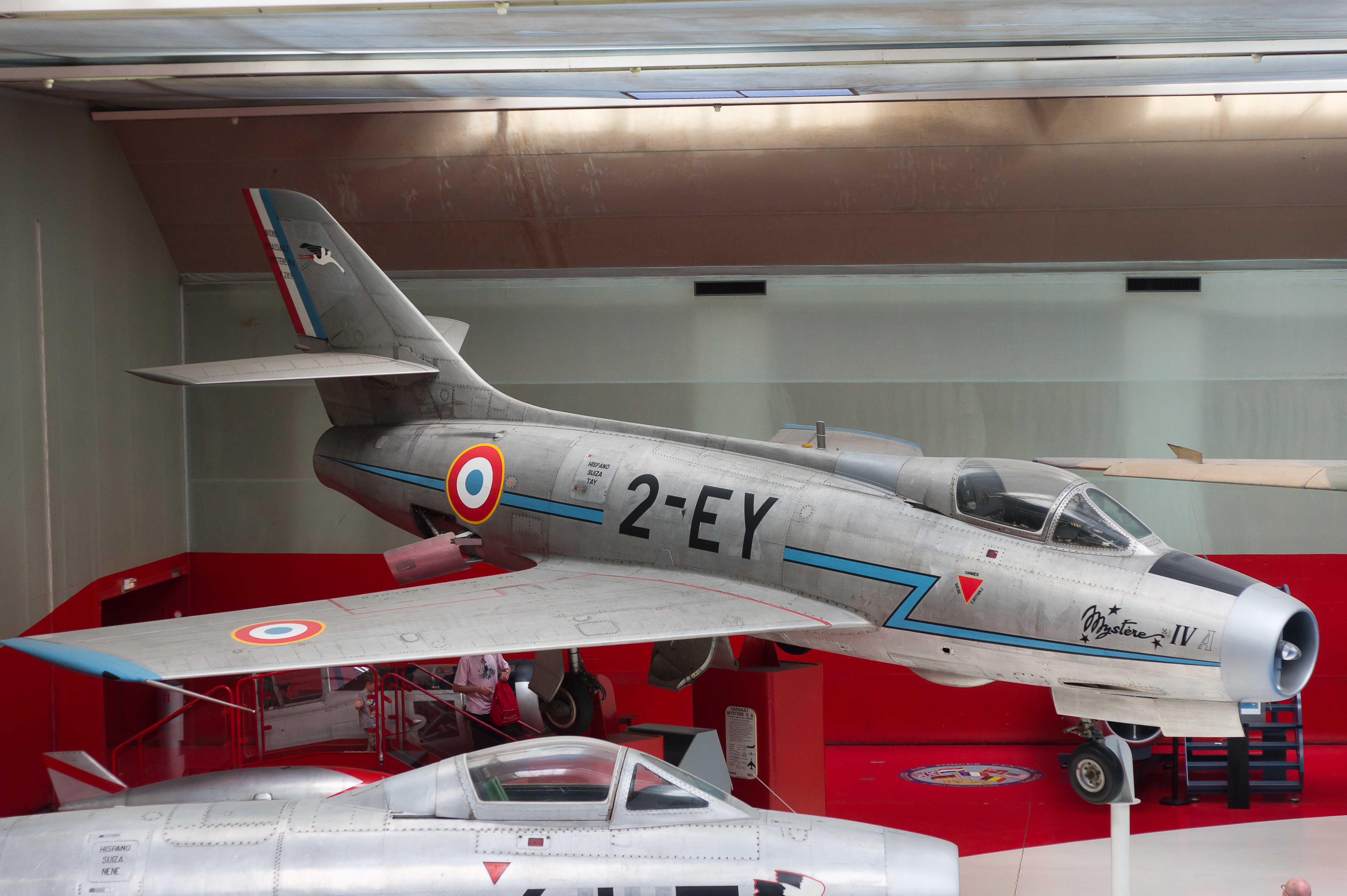 Dassault Mystère IV A au musée de l'air du Bourget